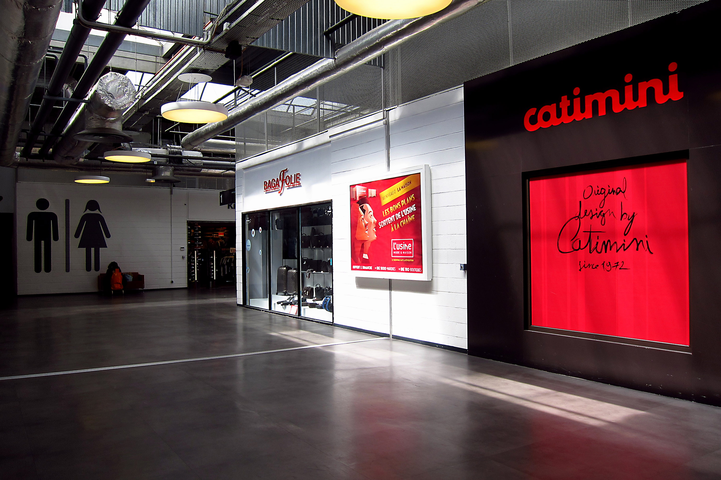 Vélizy-Villacoublay (Yvelines, Île-de-France, France) : Une allée du premier étage (consacré à la mode) du centre commercial L'Usine Mode & Maison".